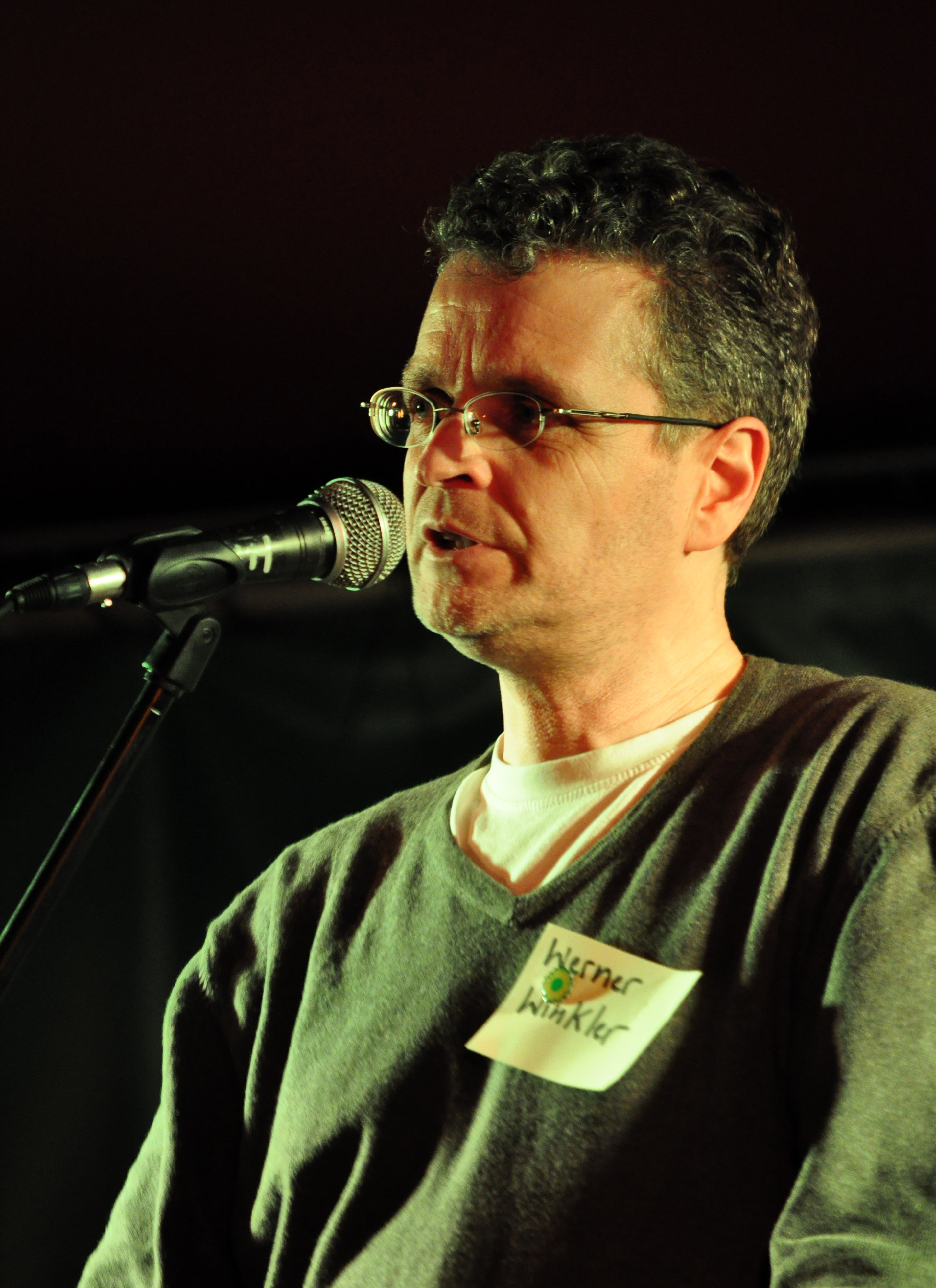 Urwahlforum Bündnis 90/Die Grünen in Rostock am 24.10.2012.